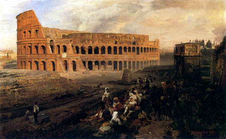 Vor dem Kolosseum